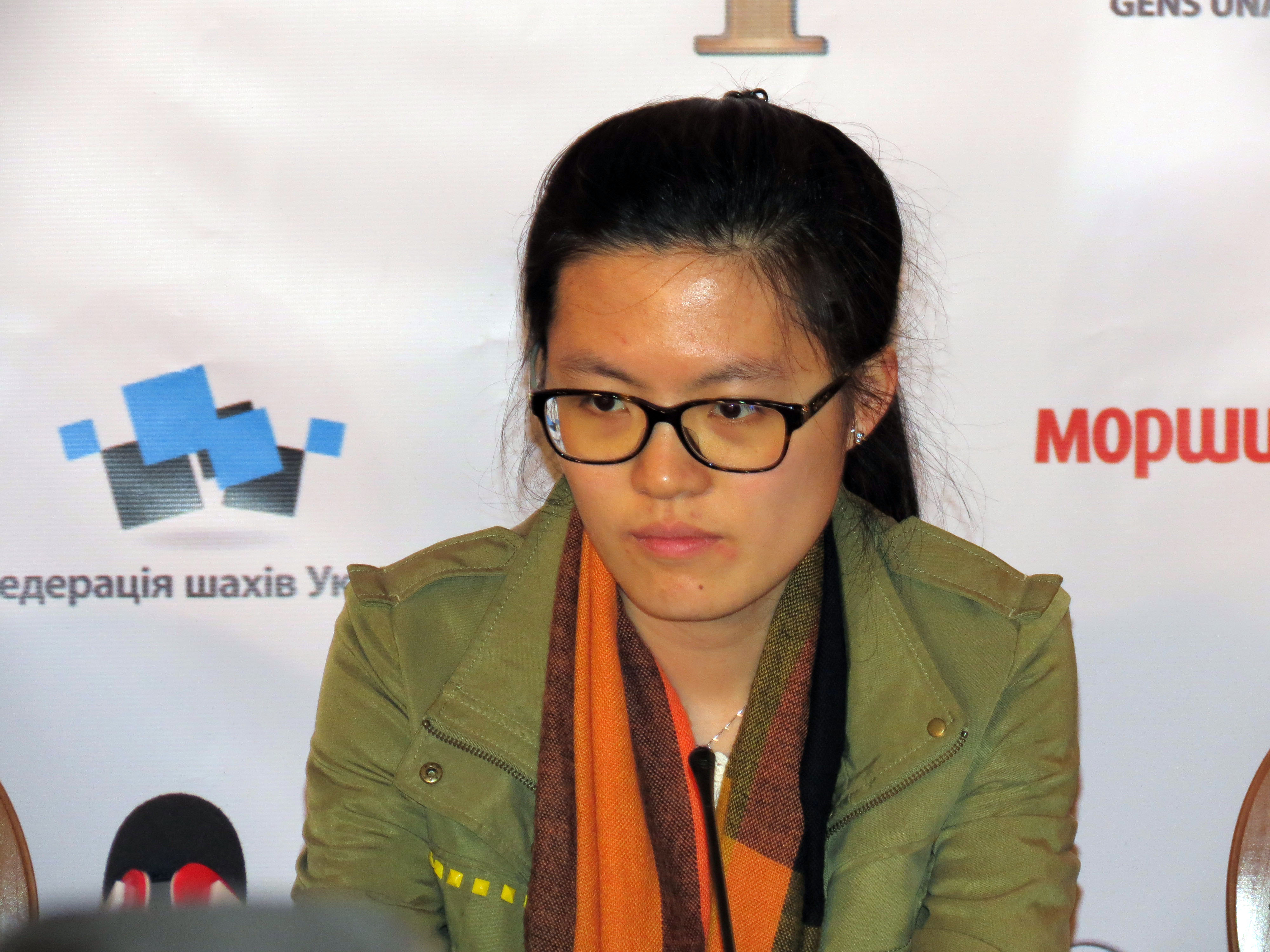 Хоу Іфань, матч за звання чемпіонки світу з шахів серед жінок 2016 (прес-конференція 12-03-2016)